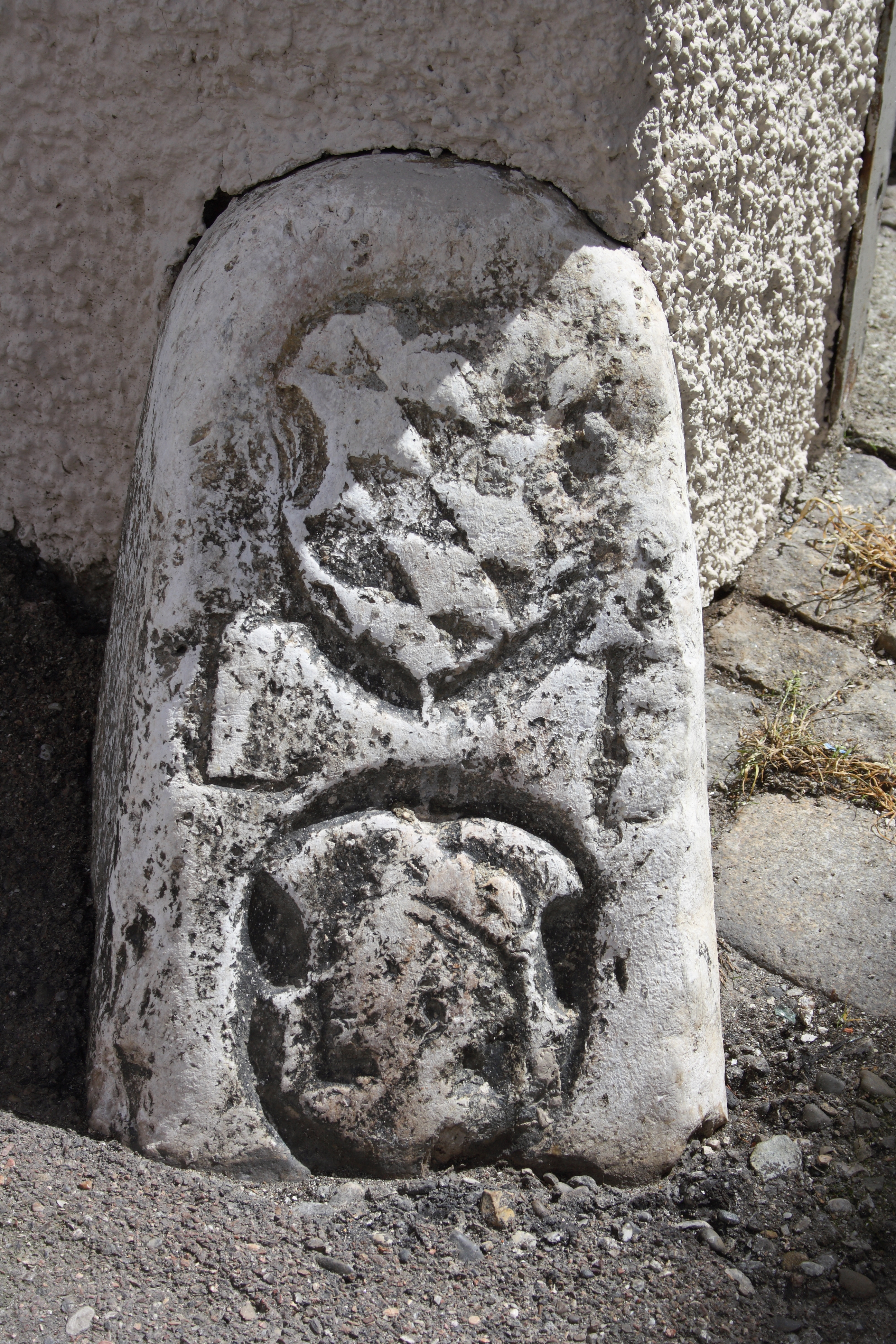 Ehemaliges Bruckhaus in Lauingen im Landkreis Dillingen an der Donau (Bayern), Brüderstraße 11, Grenzstein am Hoftor, Wappen Bayern/Lauingen, 16./17. jahrhundert